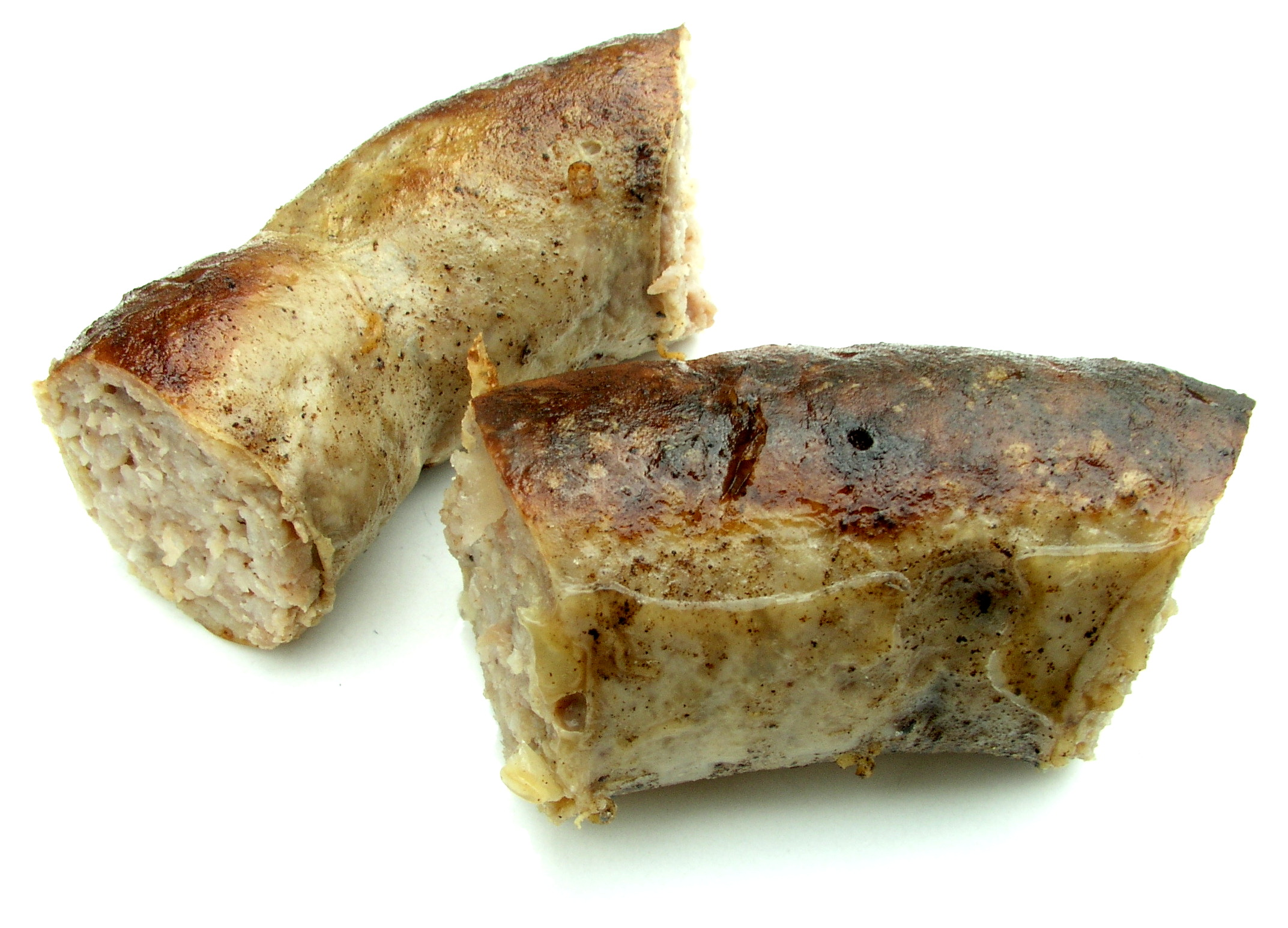 To stykker kogt og derefter stegt medisterpølse.